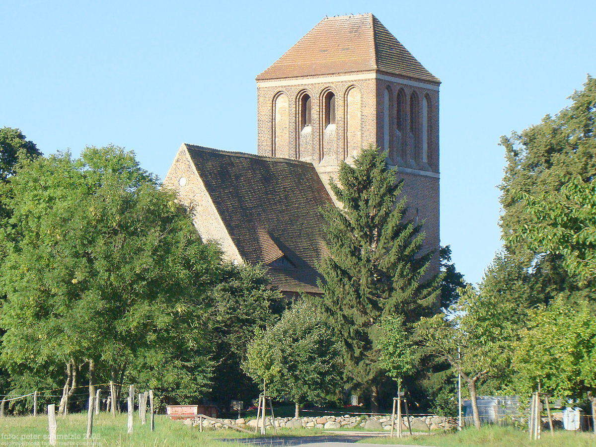 Kirche in Schwinkendorf